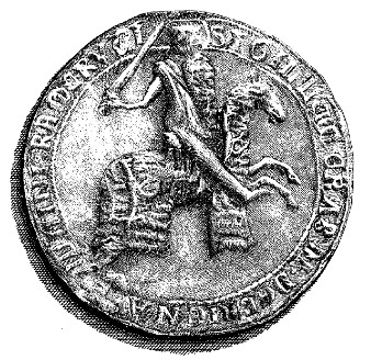 Sceaux de Érard de Brienne-Ramerupt